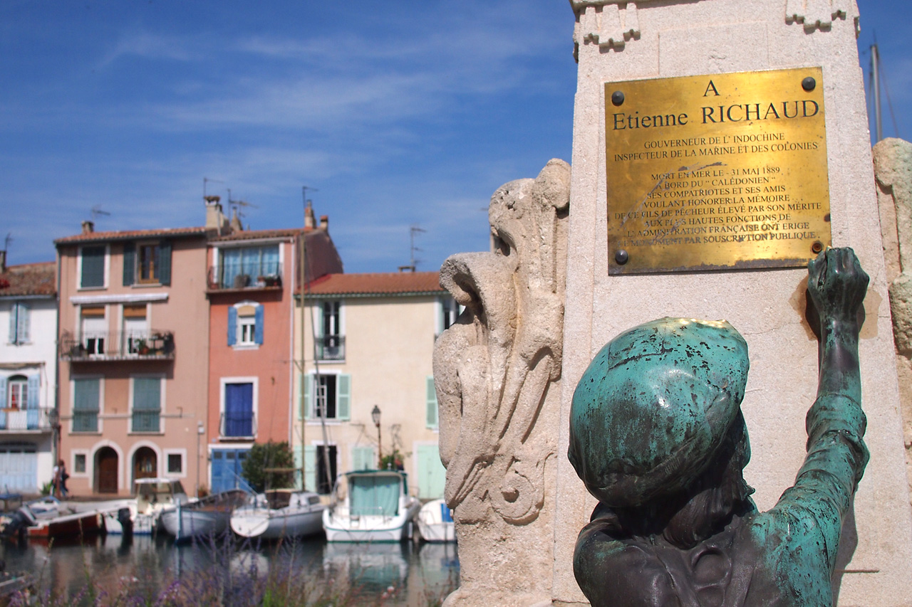 Martigues, Etienne Richaud